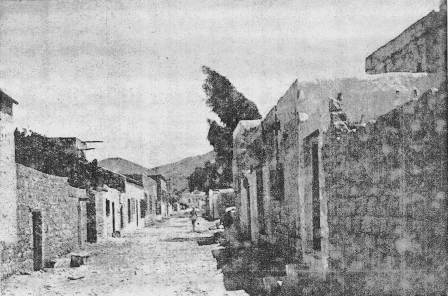 Ard el-Yahud, Haifa, Israel Was the first Jewish Neighbourhood out of the walls of Haifa. established on 1891 ארד אל-יהוד הייתה השכונה היהודית הראשונה שבנו יהודי חיפה מחוץ לחומות העיר שבנה דאהר אל-עומר השכונה נבנתה בשנת 1891 ליד ואדי רושמיה ארד אל יהוד בשנת 1925 המקור הוא ספרו של ק'י' סילמן "חיפ לתולדותיה וישובה" משנת 1931